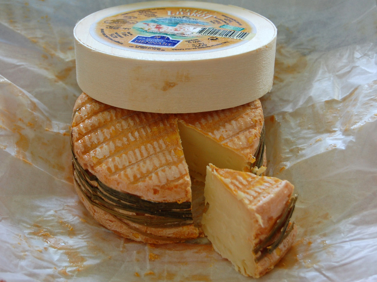 livarot cheese